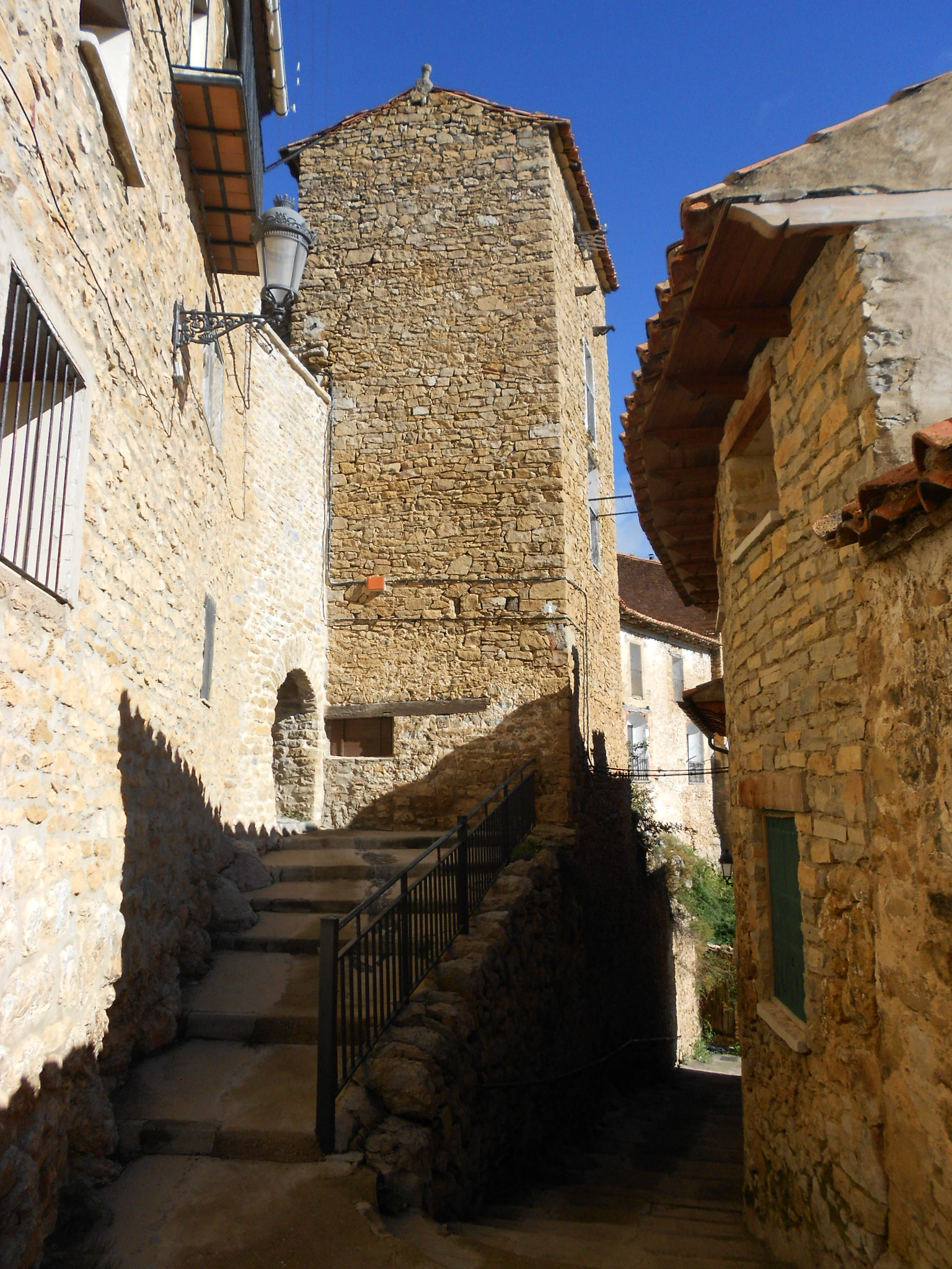 Murallas y Portal del Postigo (Mosqueruela, España)